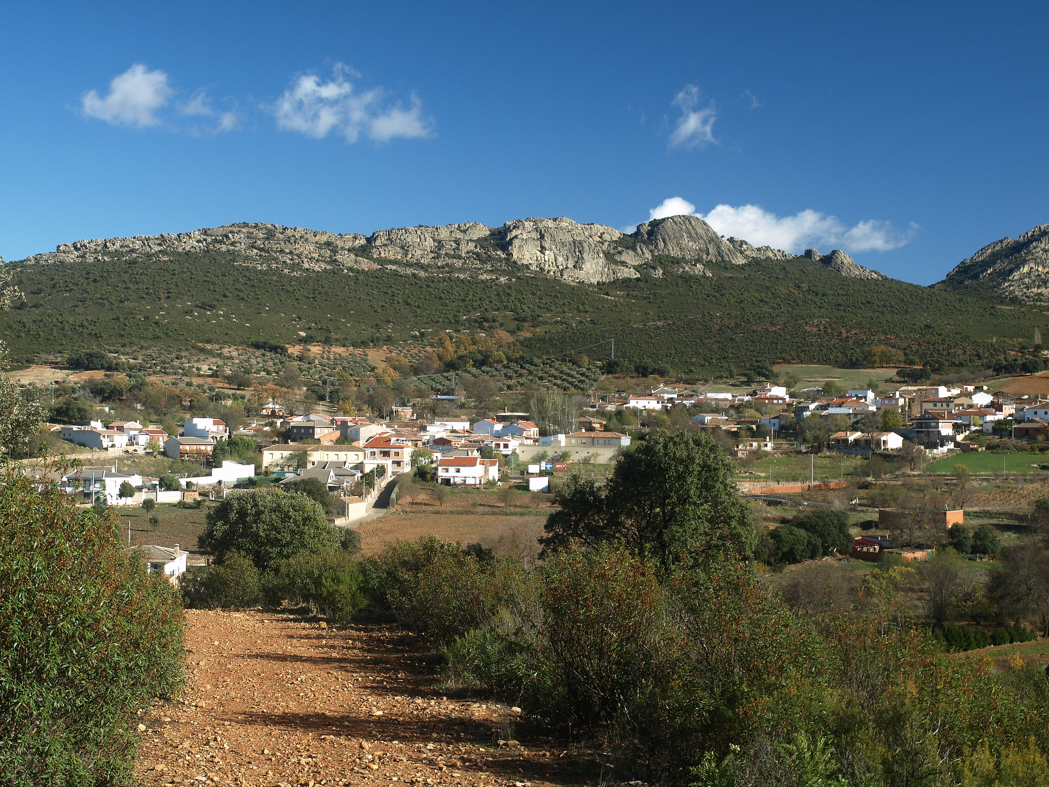 Vista de Hontanar, provincia de Toledo, Espana.